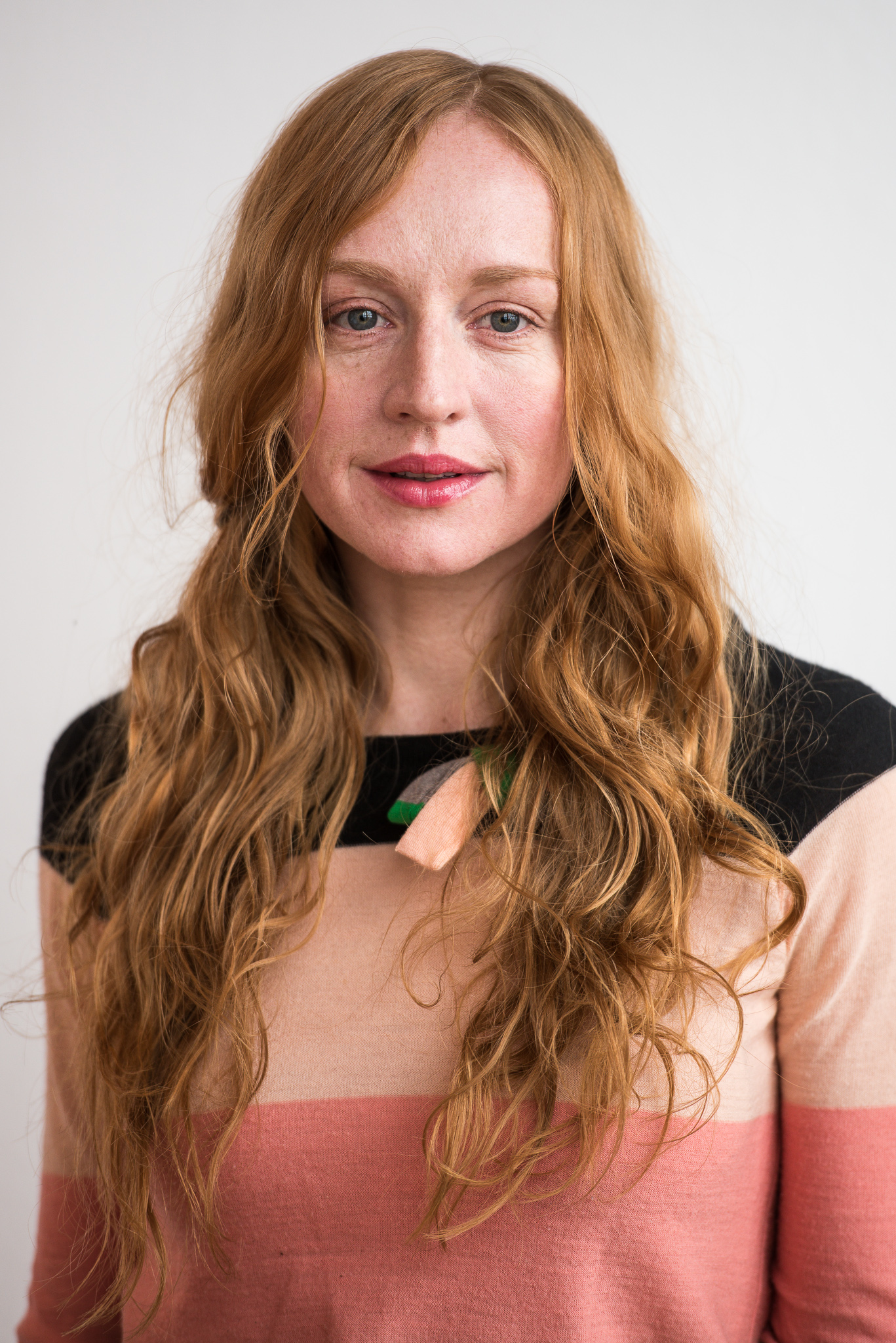 BR,Bayerischer Rundfunk,Bayerisches Fernsehen,Brigitte Hobmeier,Filmbrunch 2016